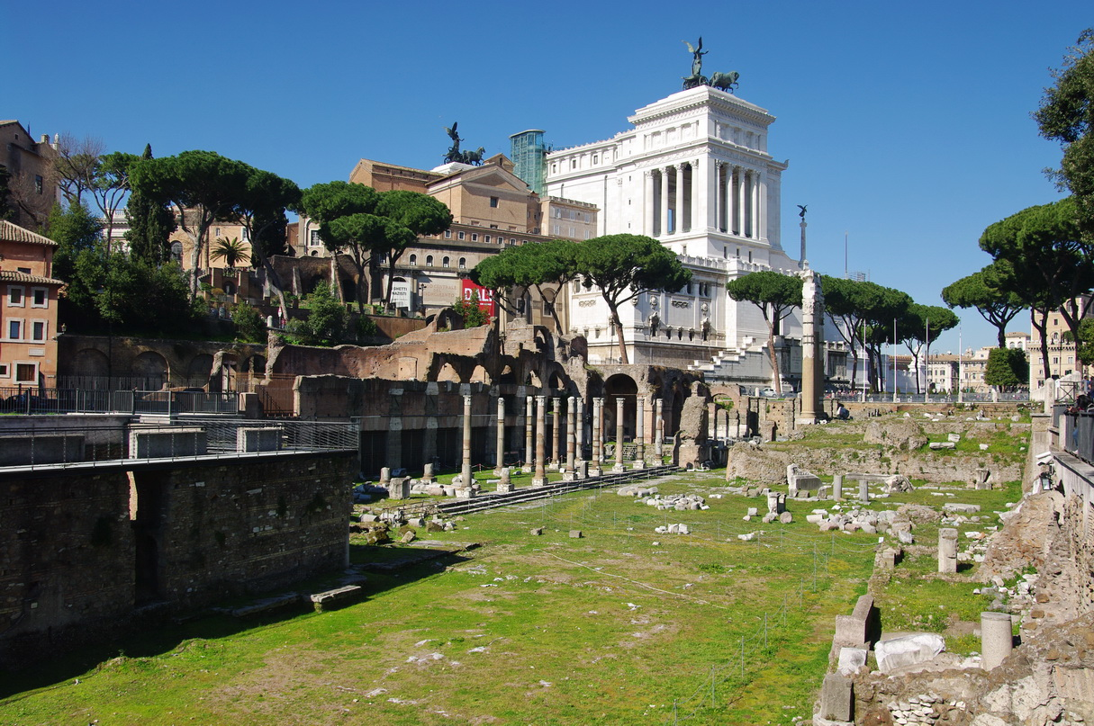 Kaiserforen und Denkmal Vittorio Emanuele